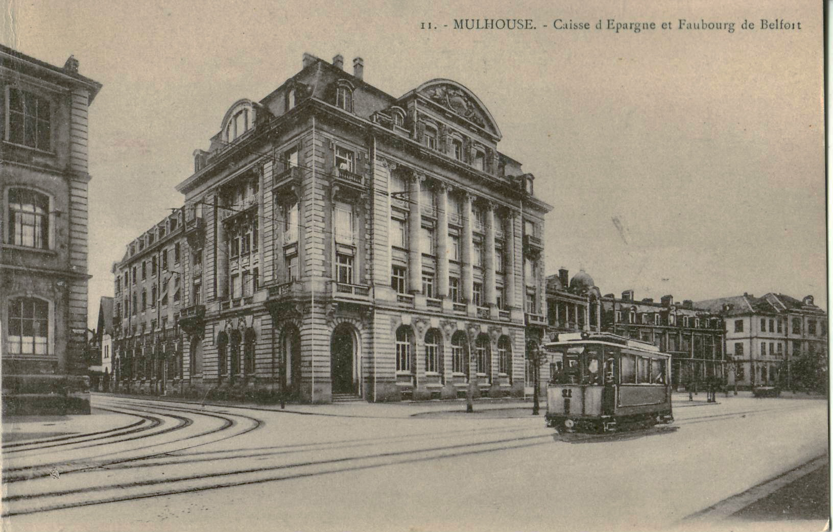 Carte postale ancienne éditée par Bergeret, n°11 : Mulhouse : Caisse d'épargne et Faubourg de Belfort (sur certains plans Rue du Faubourg de Belfort, ou Belforter Strasse avant 1918, fut rebaptisée Boulevard de la Porte Haute puis de nos jours Boulevard du Président Roosevelt)